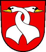 Wappen von Bütschwil